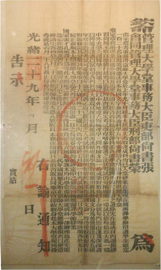 中国目前唯一发现的的京师大学堂1903年的招生布告